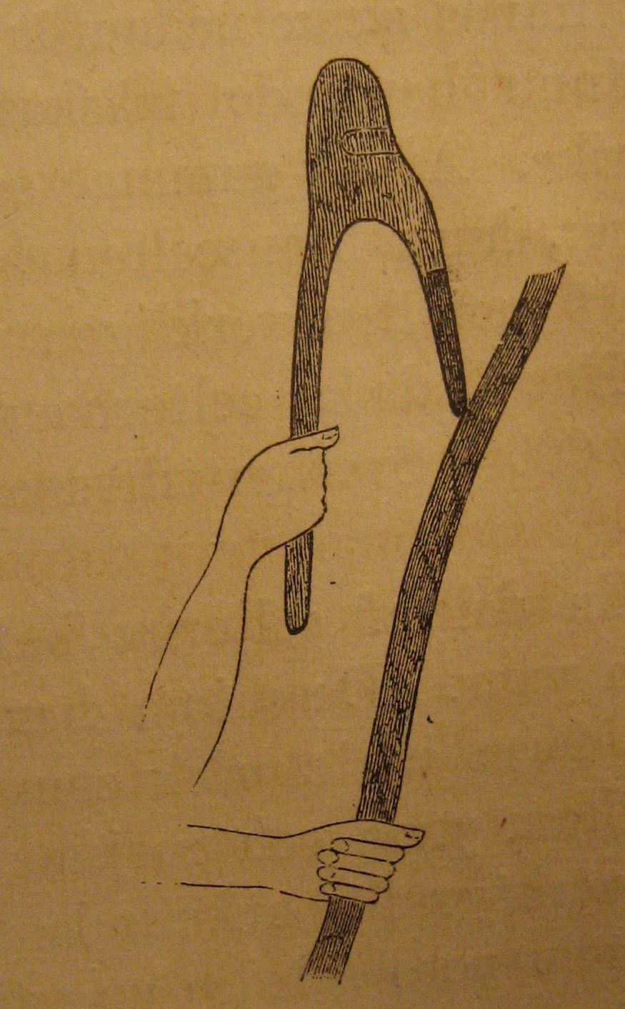 Holkyxa i brons med skaft, efter en egyptisk målning